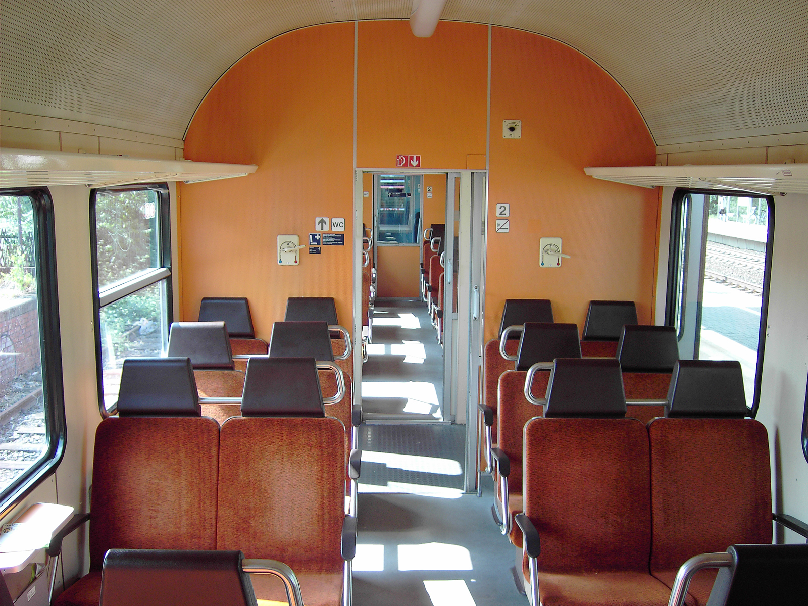 Umgebauter Silberling im CityBahn-Design